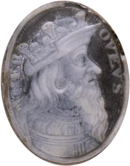 Camée représentant le buste de Mérovée de profil, à droite Date d'édition : 16 ième siècle Format : coquille ; 24 x 19 mm Droits : domaine public Source : Bibliothèque nationale de France Provenance : bnf.fr